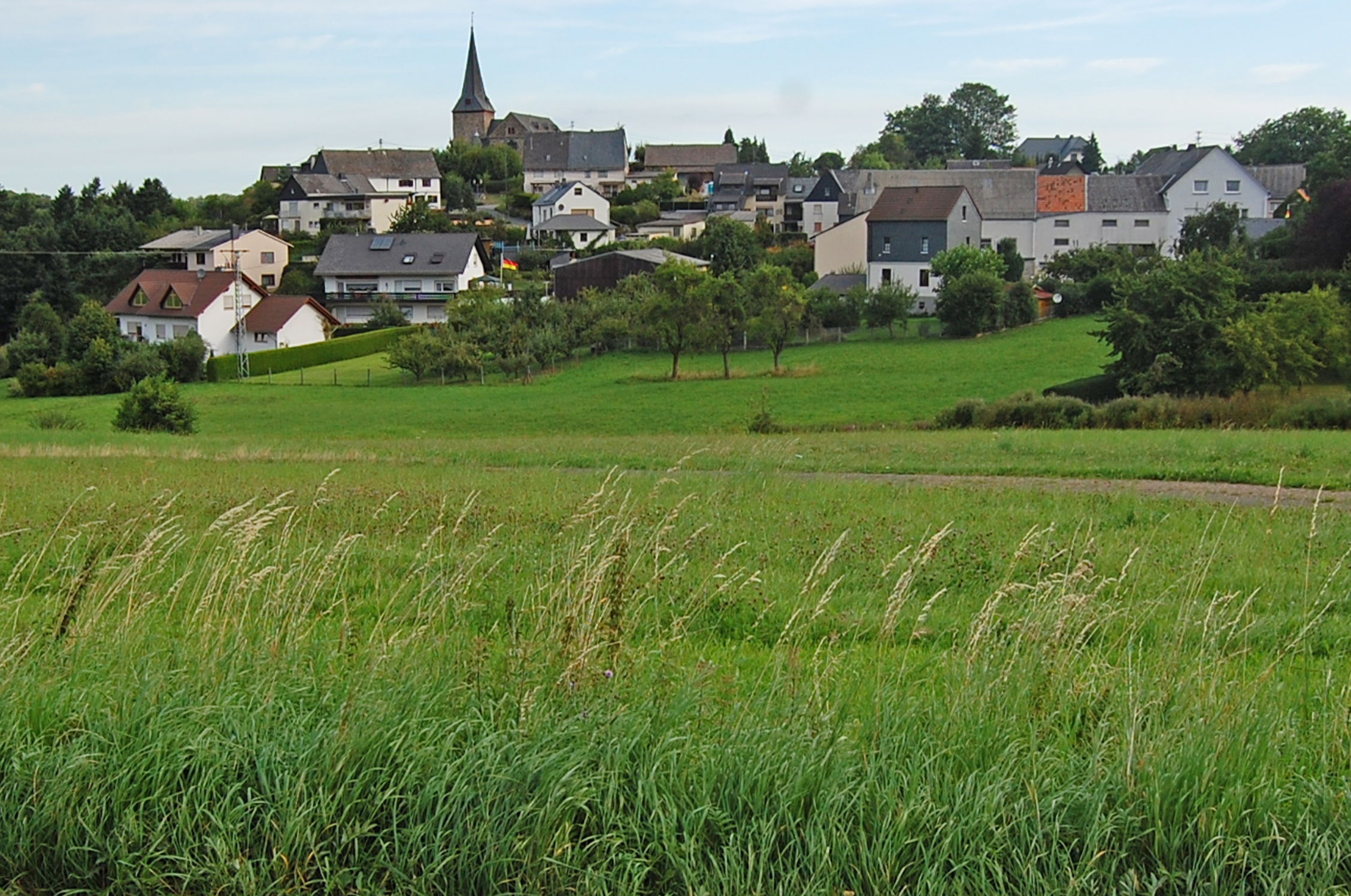 Schoenborn (Rhein-Lahn-Kreis)